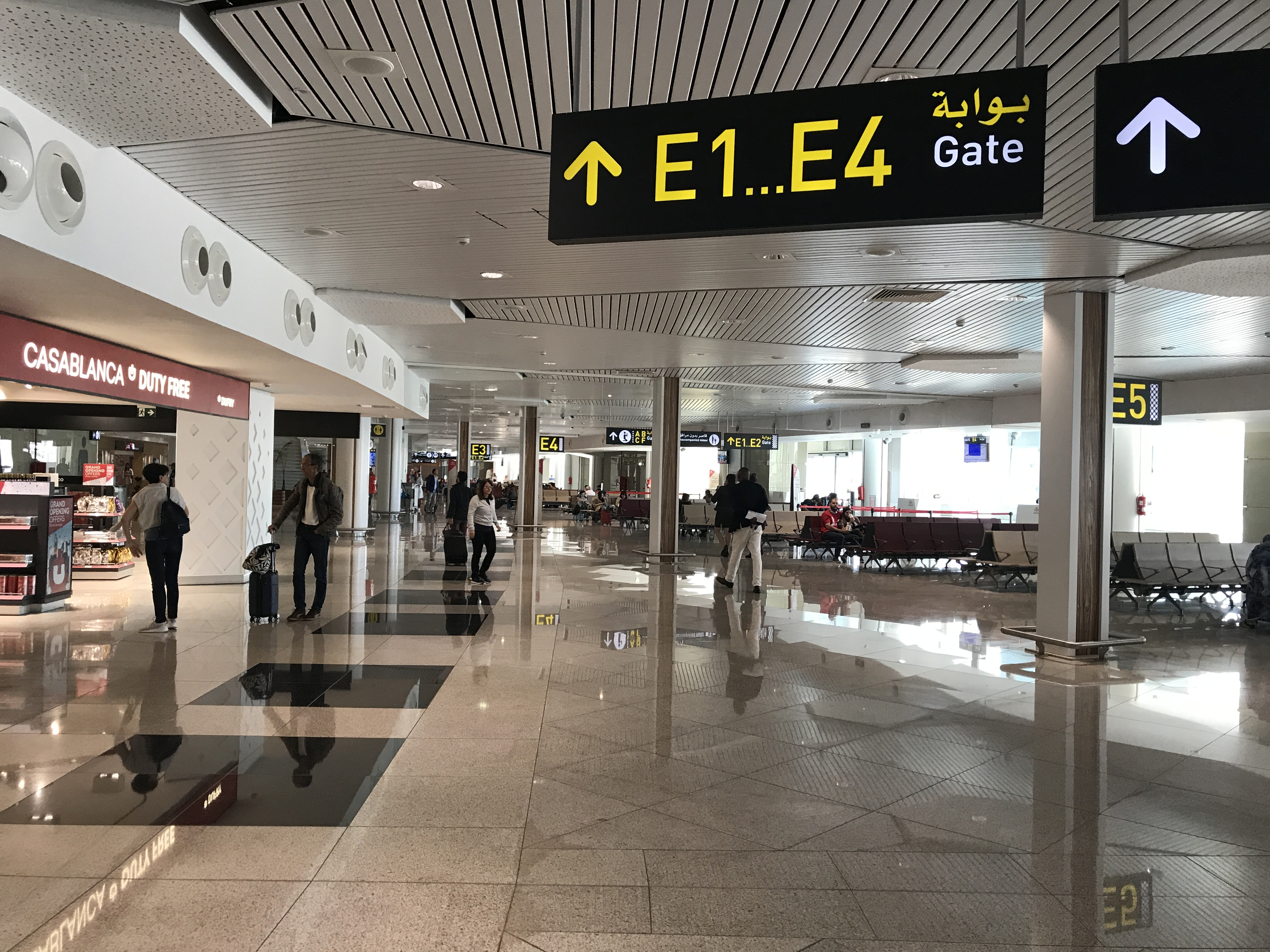 صورة للمحطة الجوية 1 لمطار محمد الخامس الدولي